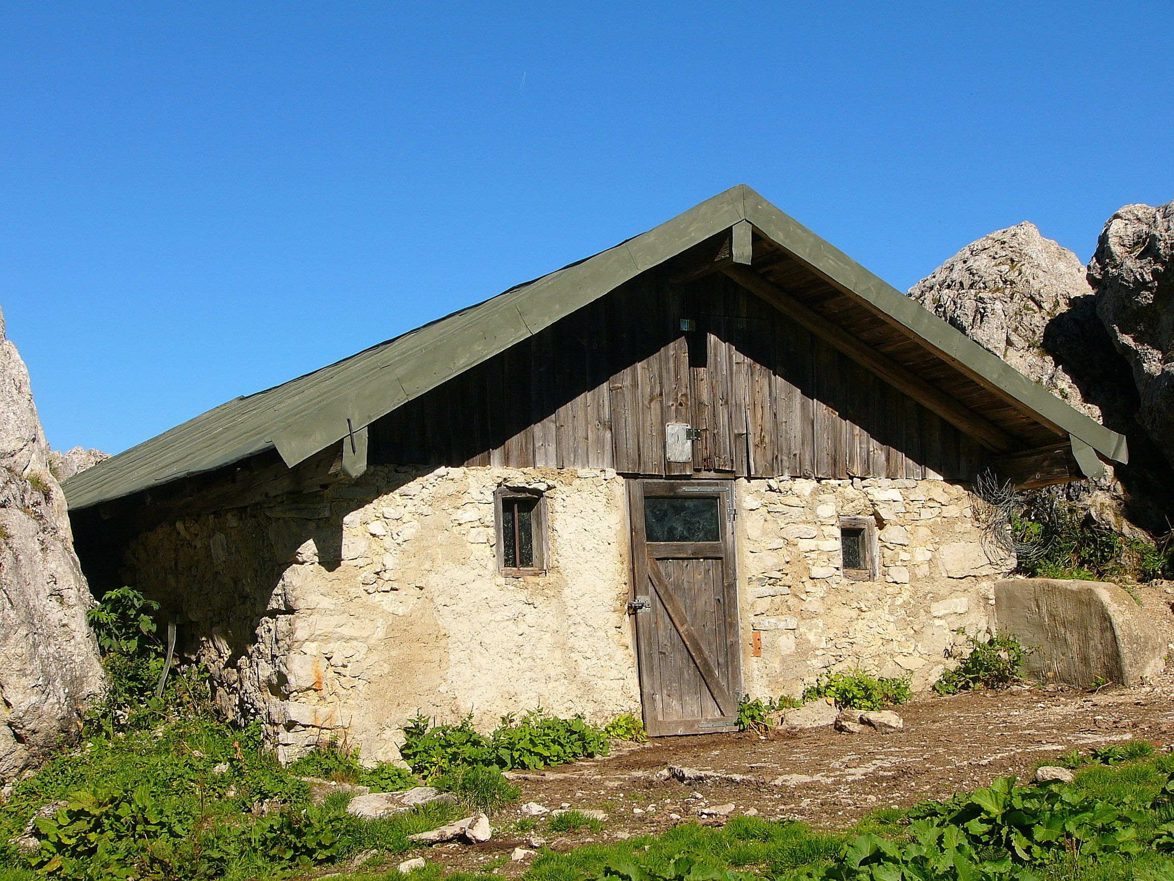 Alm; sog. Steinlingalm; eingeschossiger Satteldachbau mit unverputztem Bruchsteinmauerwerk und verschaltem Giebel; eingeschossiger Massivbau mit Satteldach und verschaltem Giebel, stark erneuert; wohl Ende 18. Jh.This is a photograph of an architectural monument.